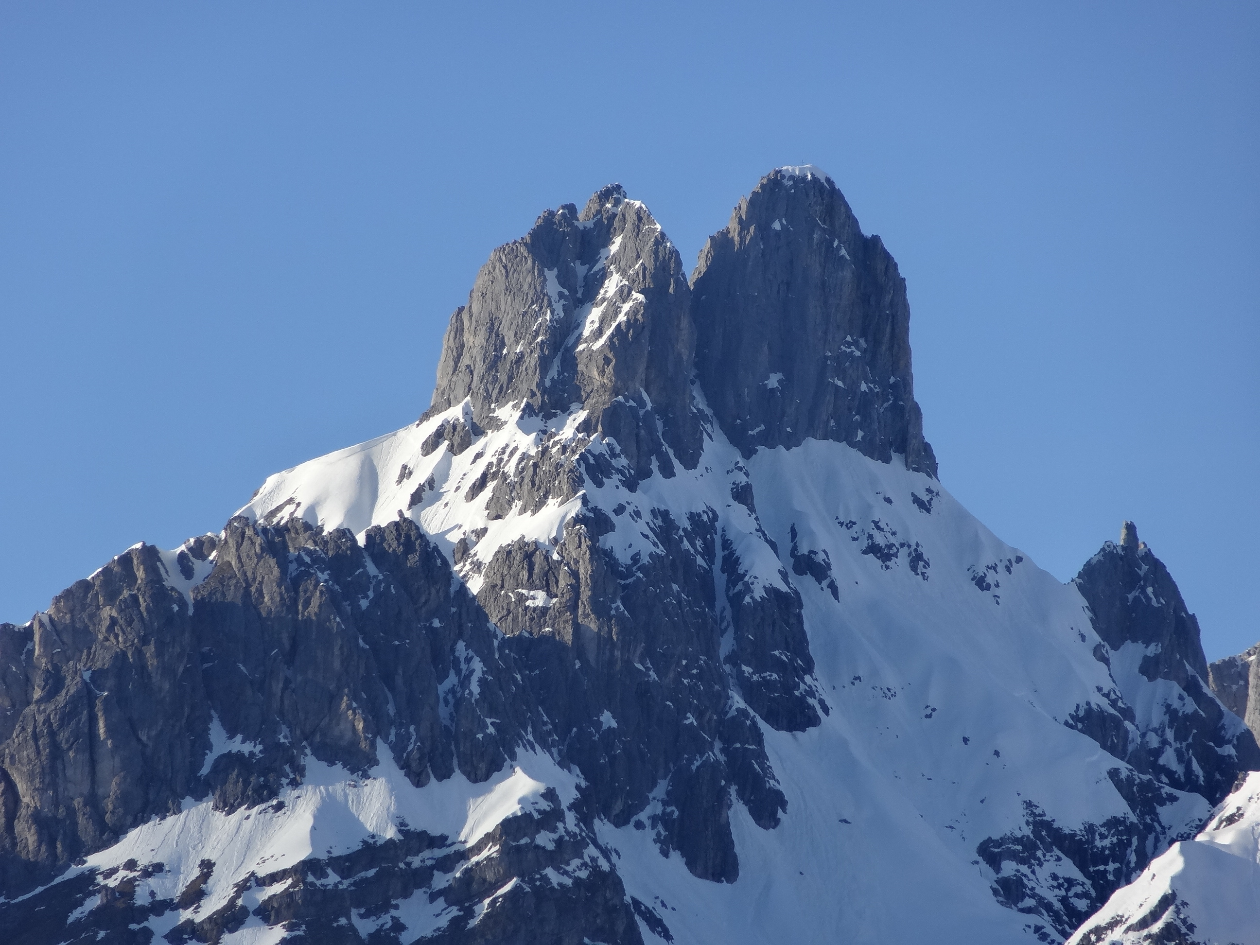 Bischofsmütze